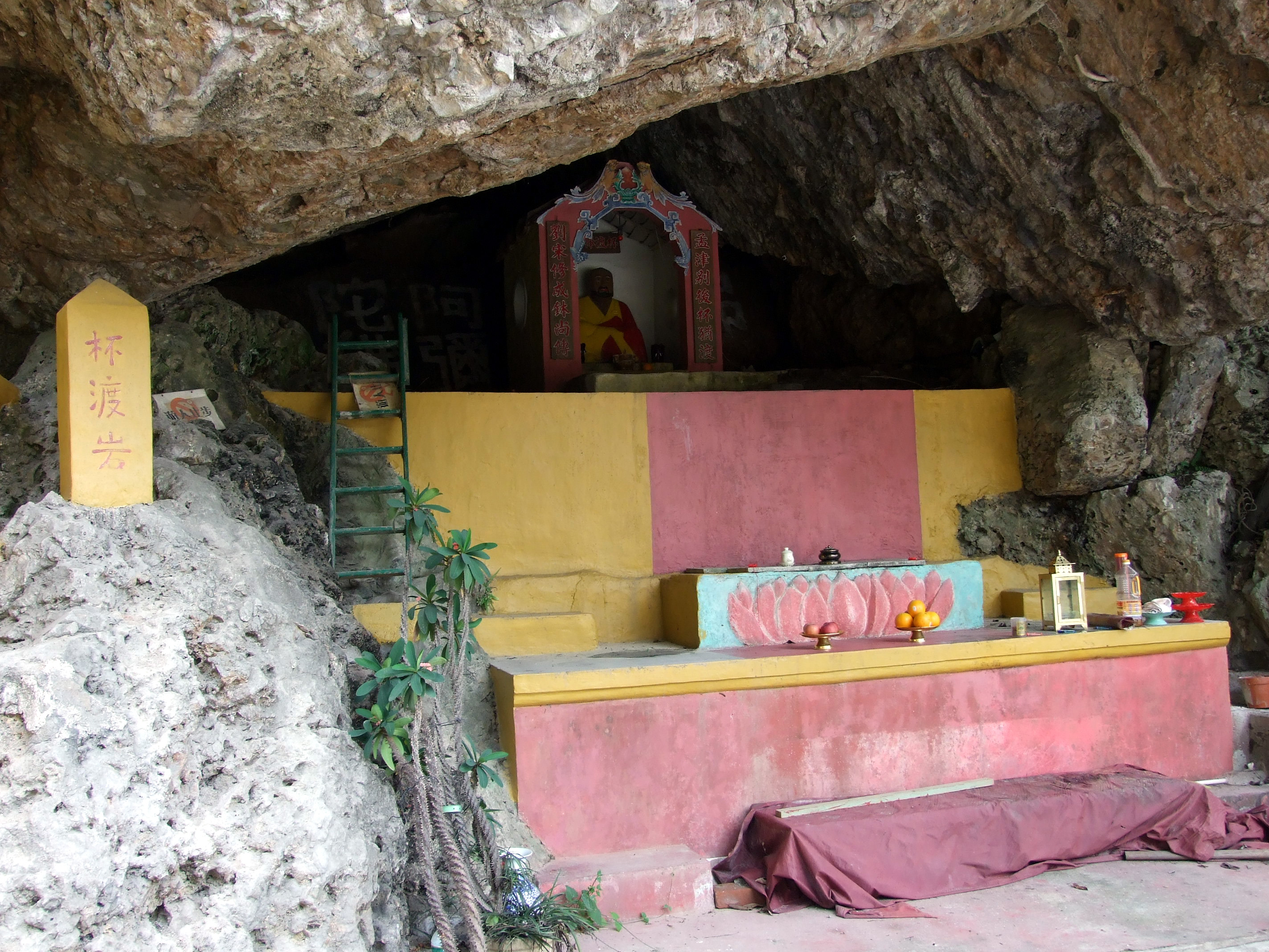 中文（香港）: 青山禪院杯渡岩